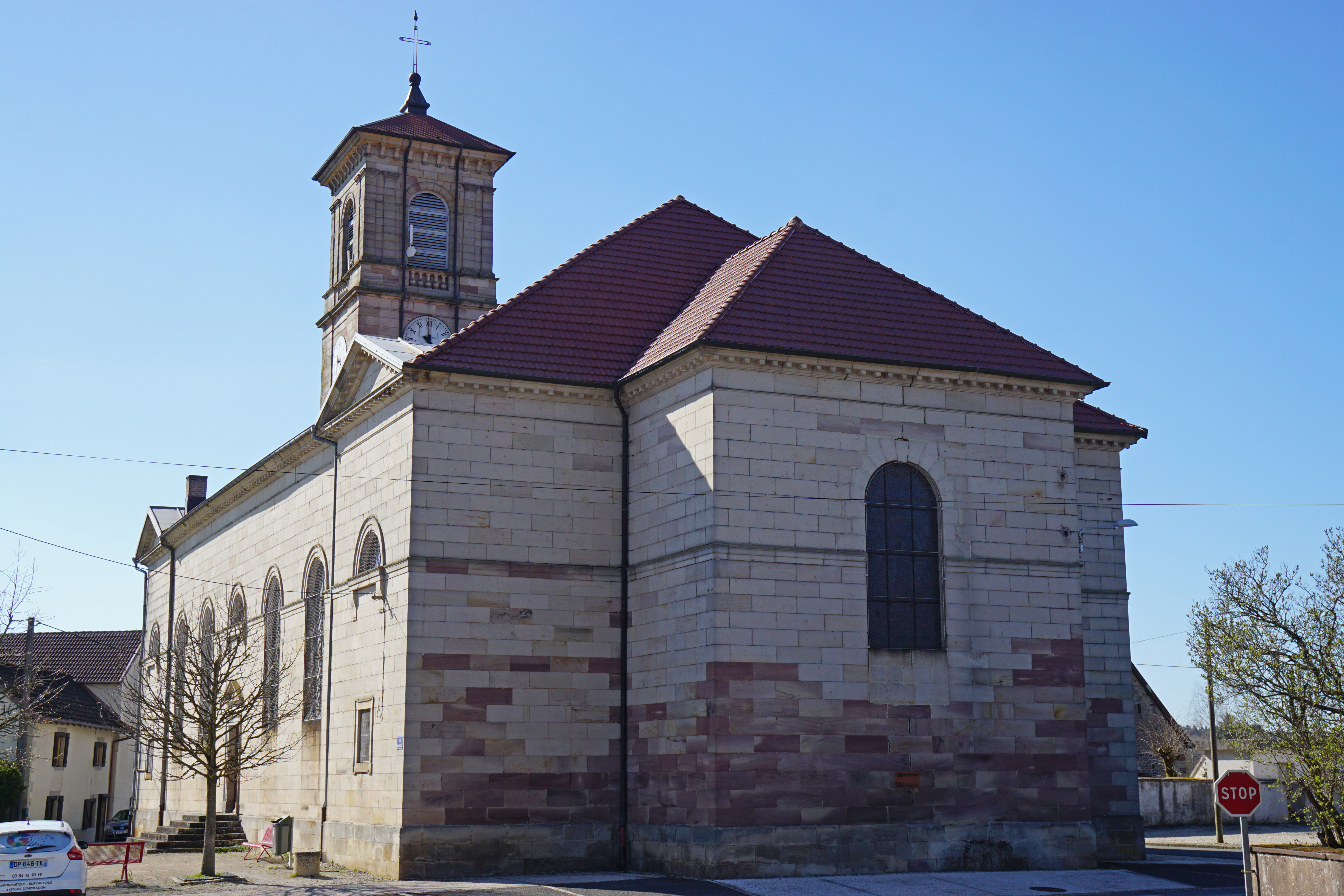 L'église Saint-Germain à Saint-Germain en Haute-Saône.